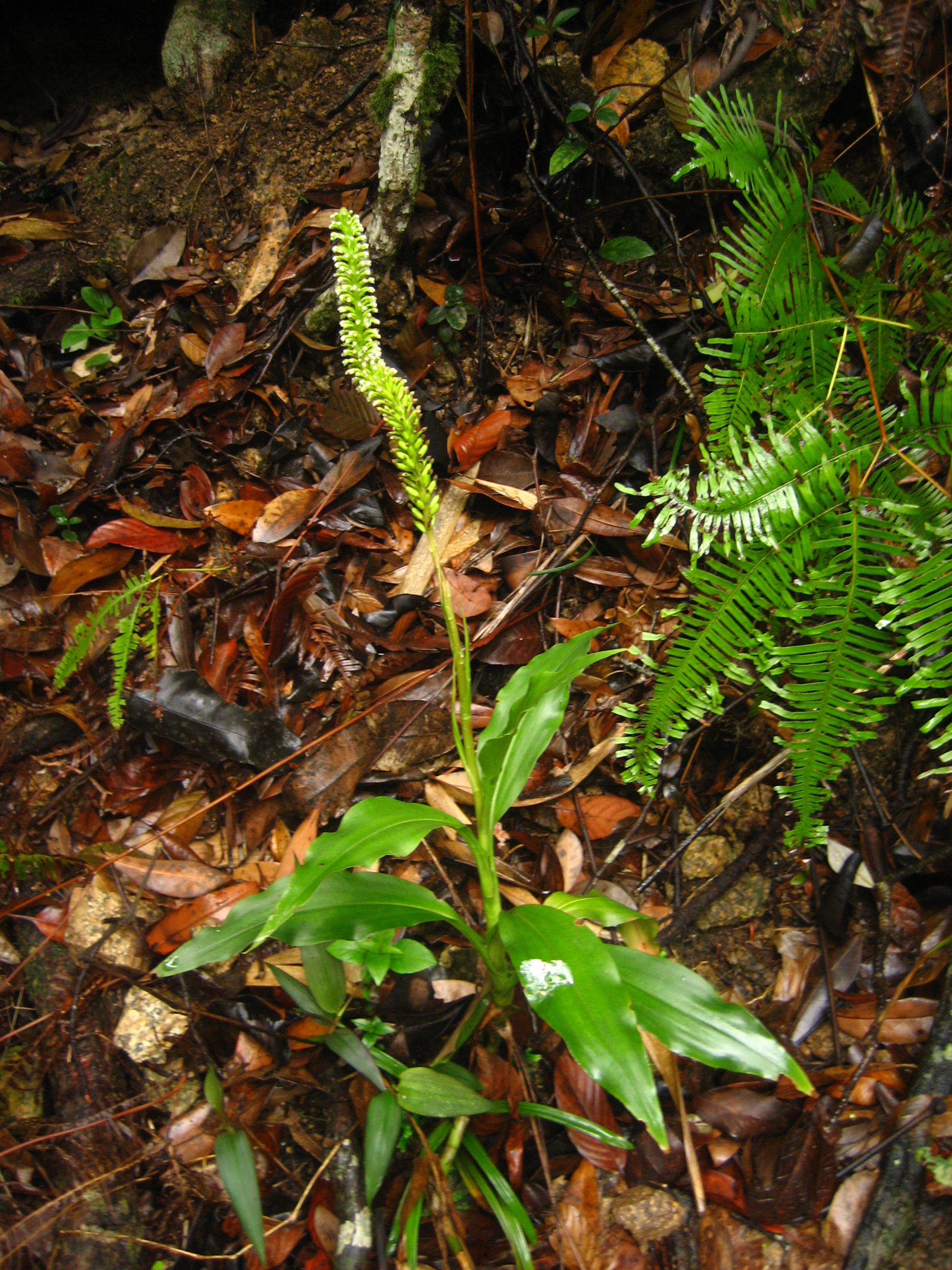 高斑叶兰的带花植株